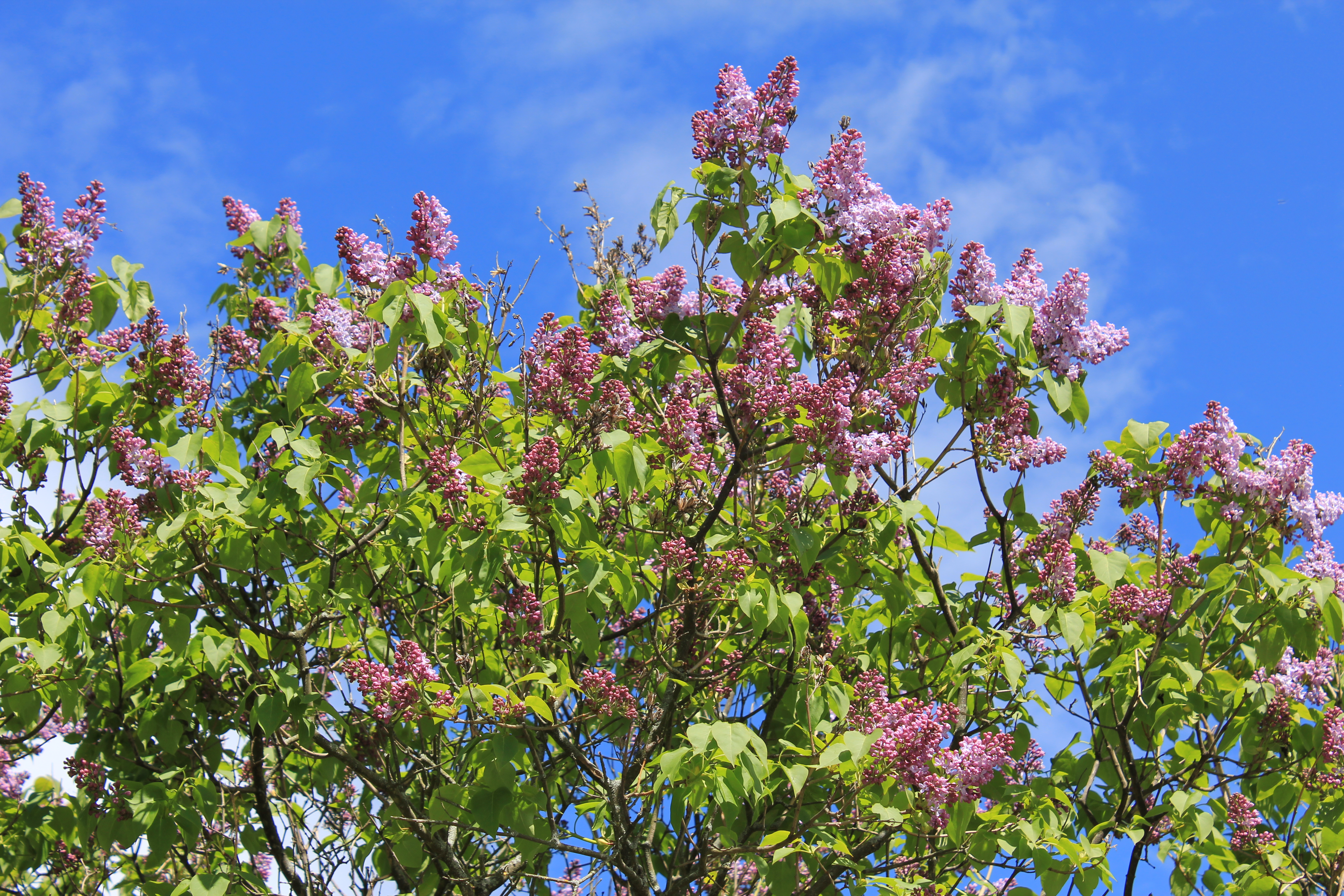 Syriner